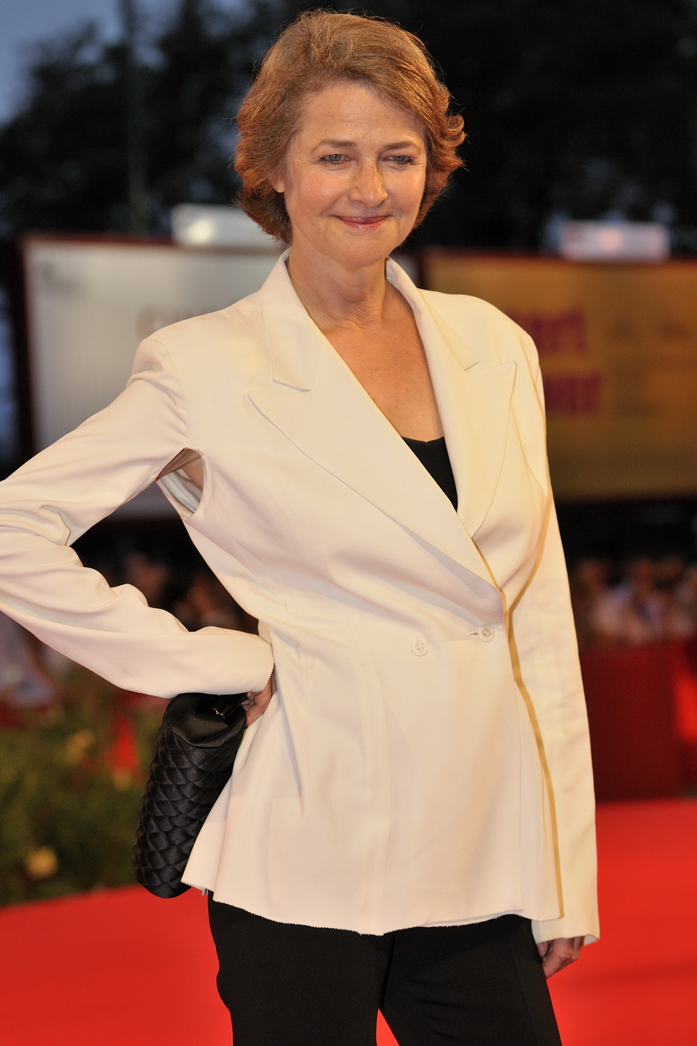 66ème Festival du Cinéma de Venise (Mostra), 2ème jour (03/09/2009) Tapis Rouge avec Charlotte Rampling pour le film : "life during a wartime".